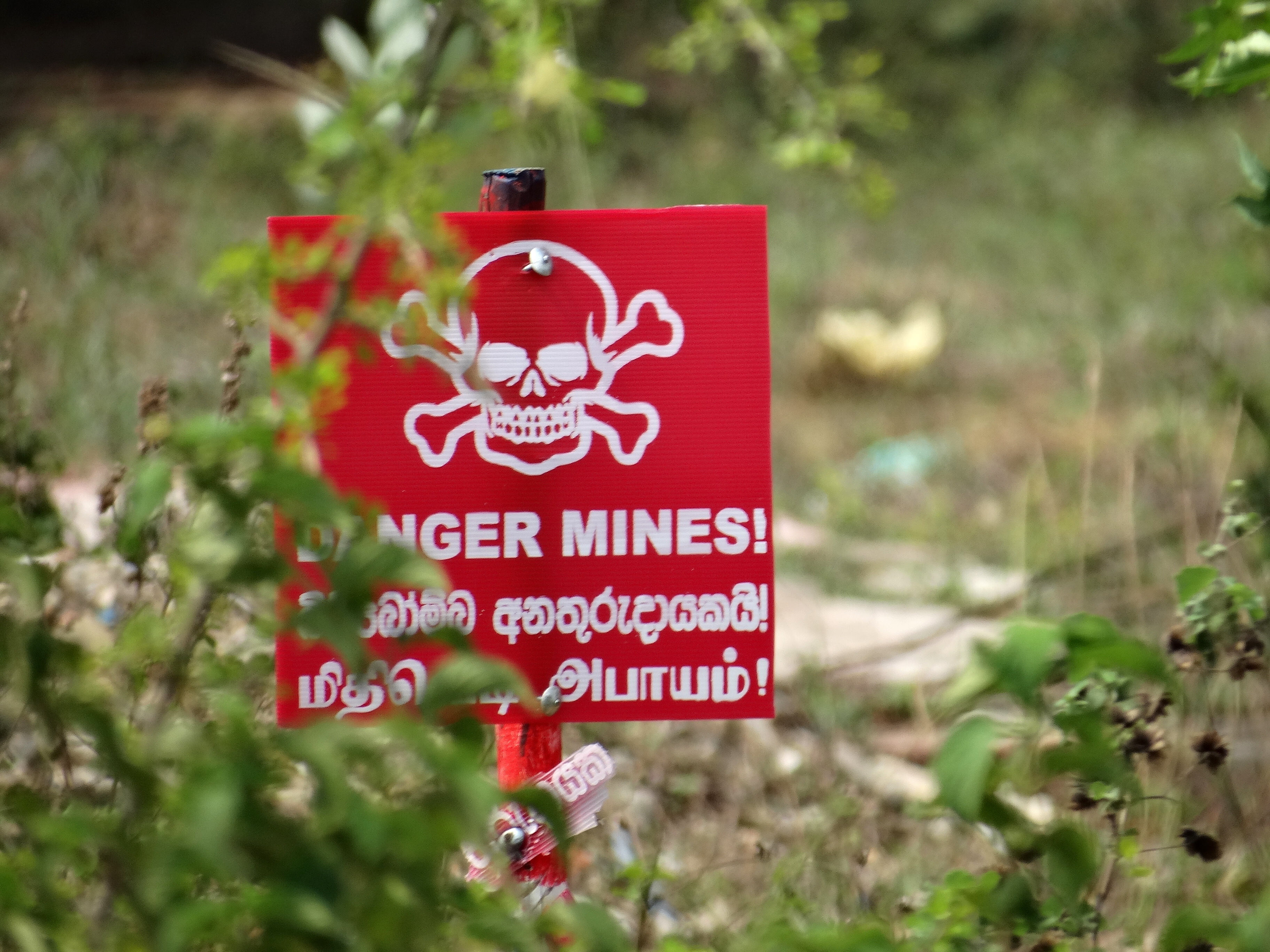 Danger Mines! - Sign en route to Jaffna - Sri Lanka